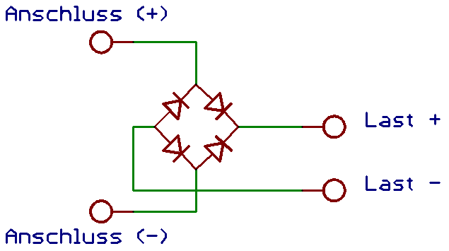 Verpolungsschutz mit Brückengleichrichter